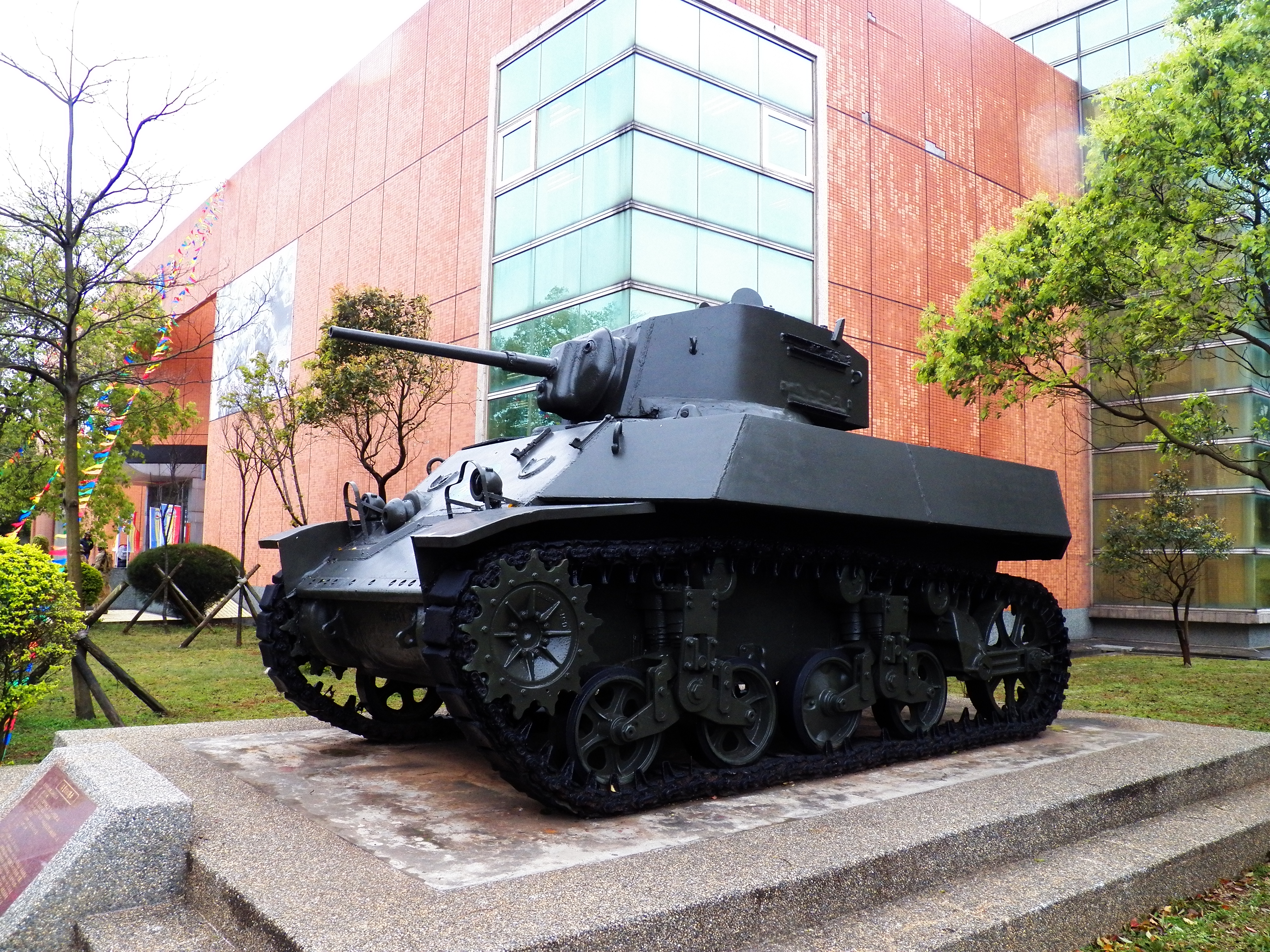 裝甲兵學校校史館前，置於M5A1旁展示的M3A3輕戰車。